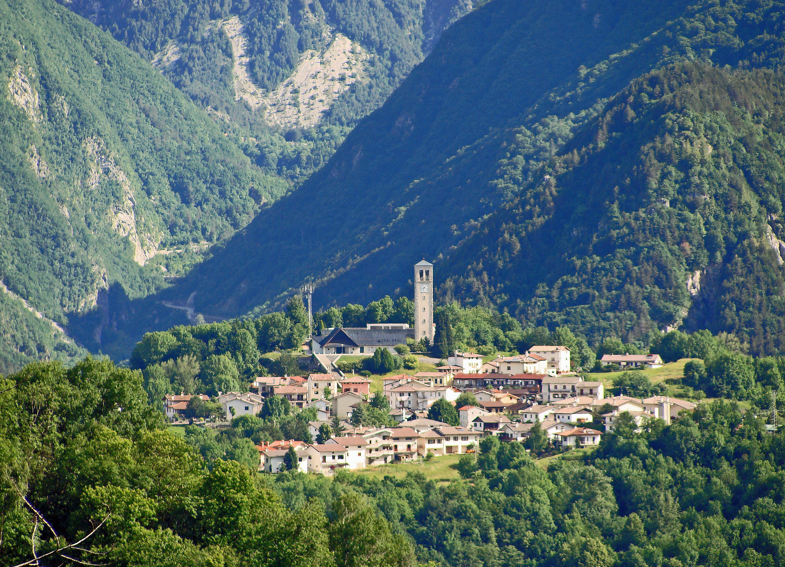 Lusevera (Bardo in sloveno, Lusèvare in friulano) è un comune italiano della provincia di Udine in Friuli-Venezia Giulia.